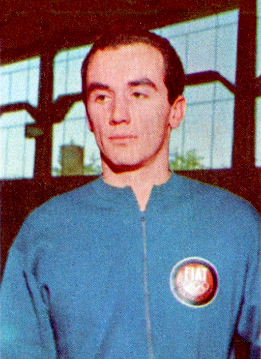 CAMPIONI DELLO SPORT 1967/68-n.330 - DELLA SAVIA - NUOTO